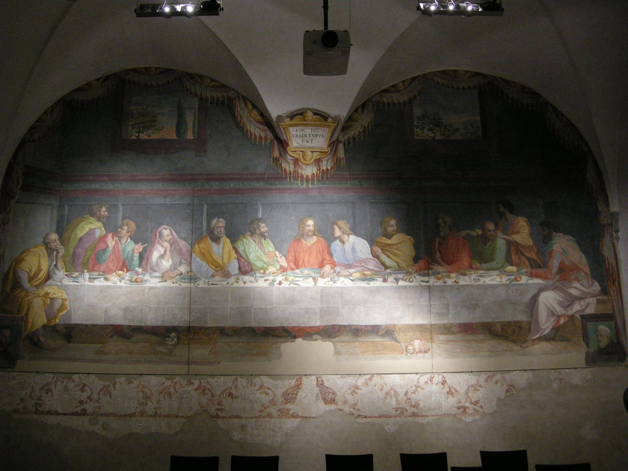 Carmine, cenacolo di alessandro allori, 01